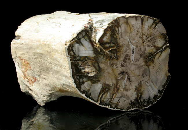 skrzemieniałe drewno, pochodzenie Madagaskar; autor zdjęcia Stowarzyszenie Spirifer